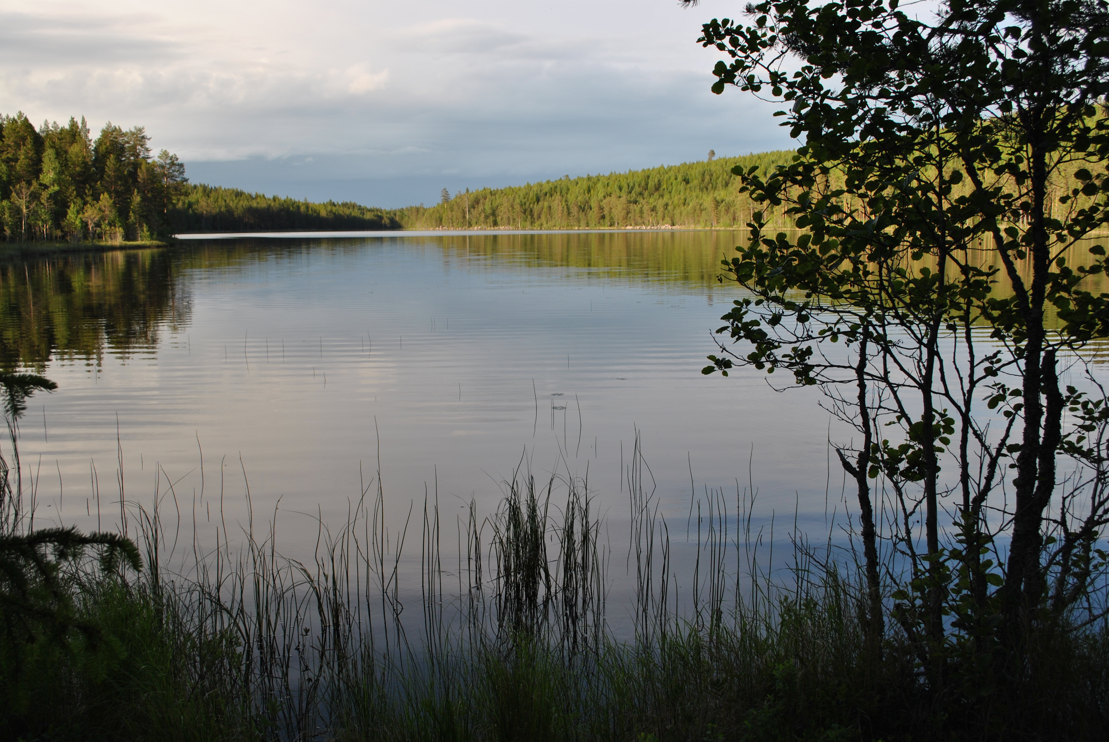 Skisstjärn, Floda sn, Dalarna, midsommarkväll 2015